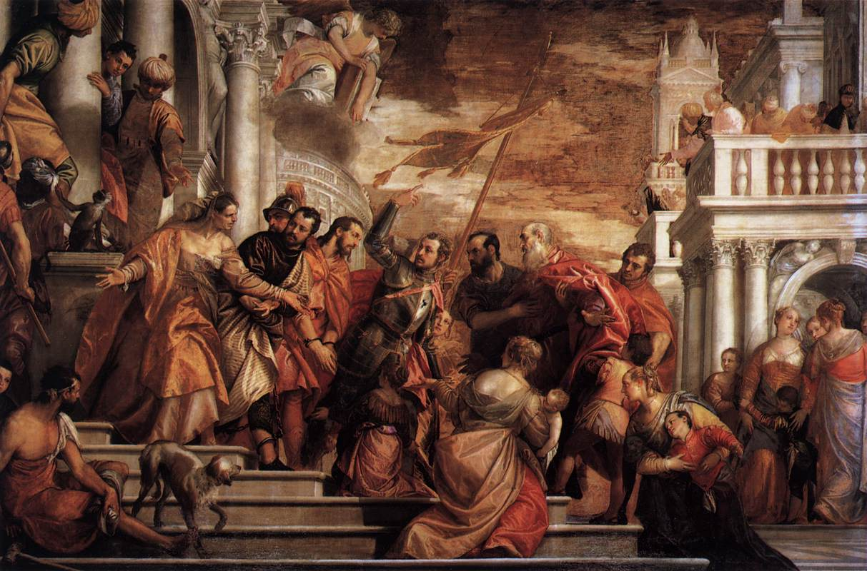 Saint Marc et saint Marcellin encouragés par saint Sébastien sur la voie du martyre